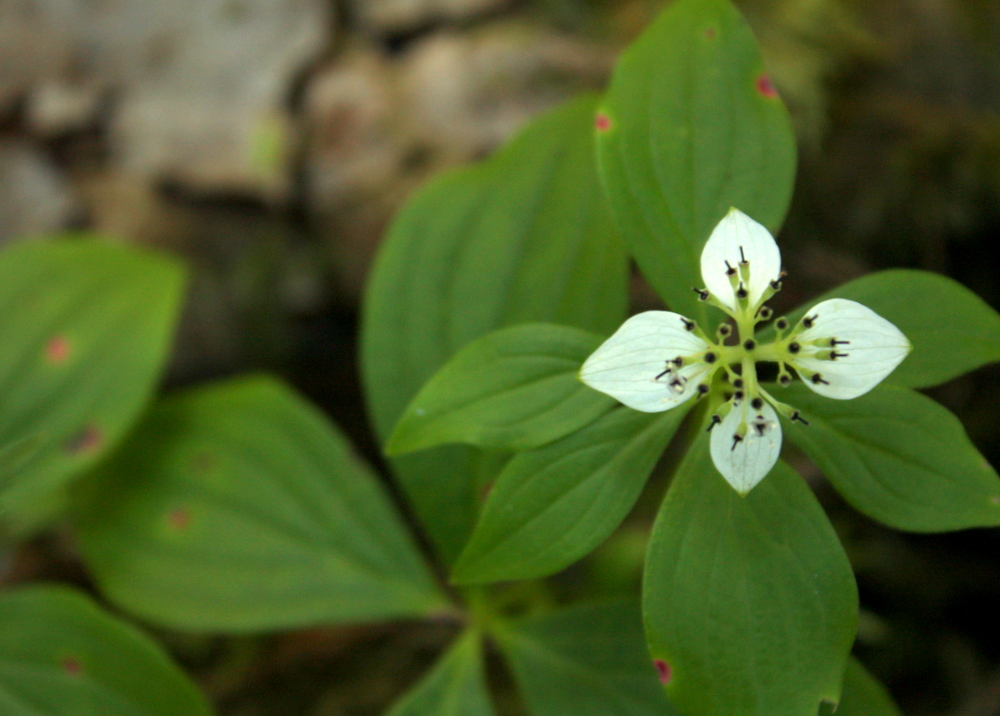 Bunchberry